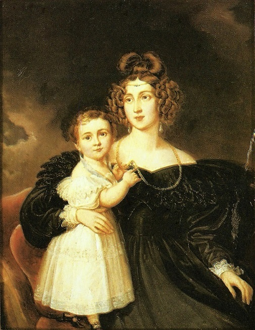 Izabela Sanguszkowa z córką Jadwiga